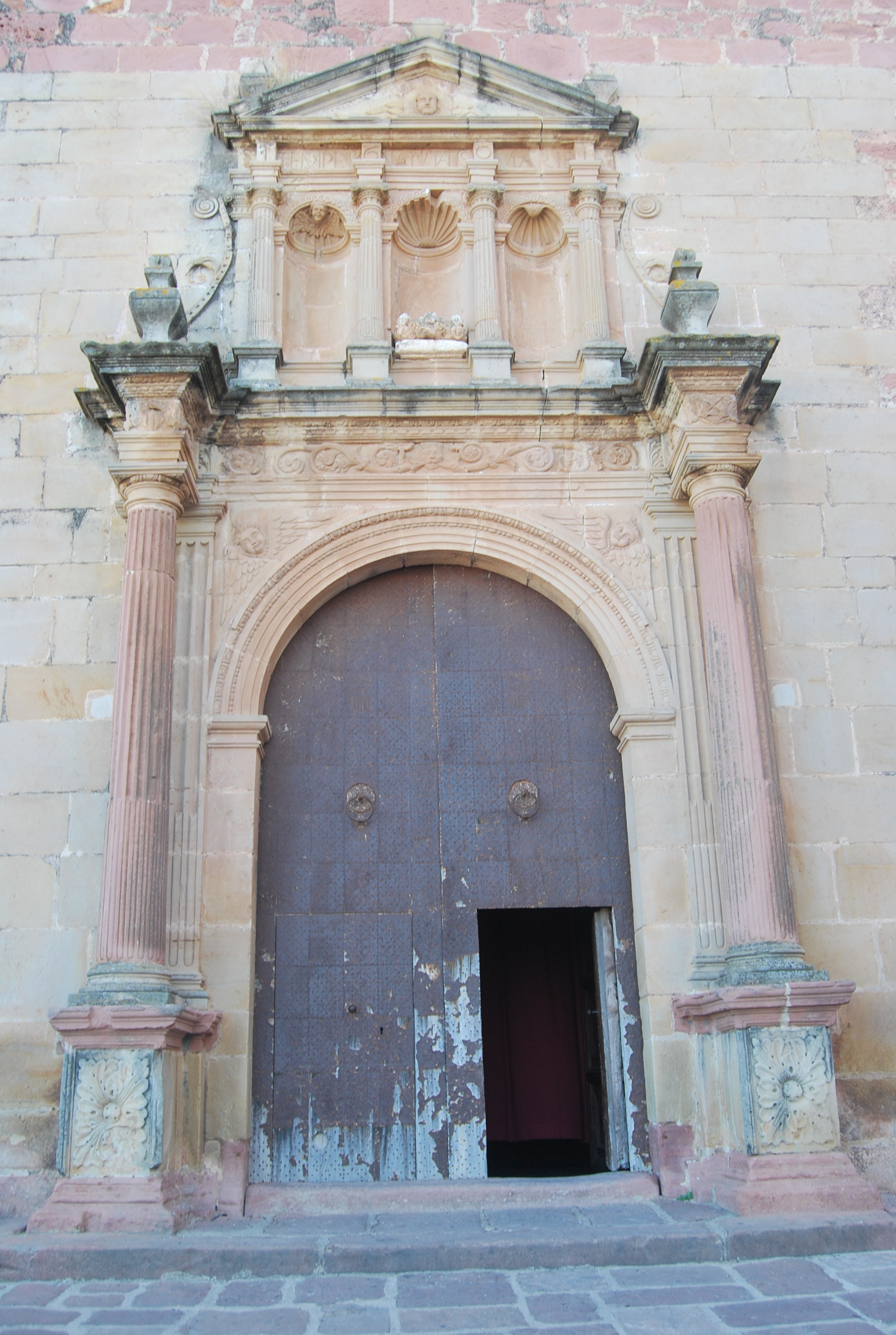 Església de l'Assumpció, Vilafamés 05.128-004.